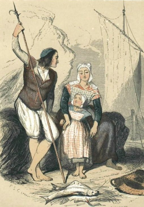 Plounéour-Trez : habitants en 1844 (dessin publié dans "La Bretagne" de Jules Janin